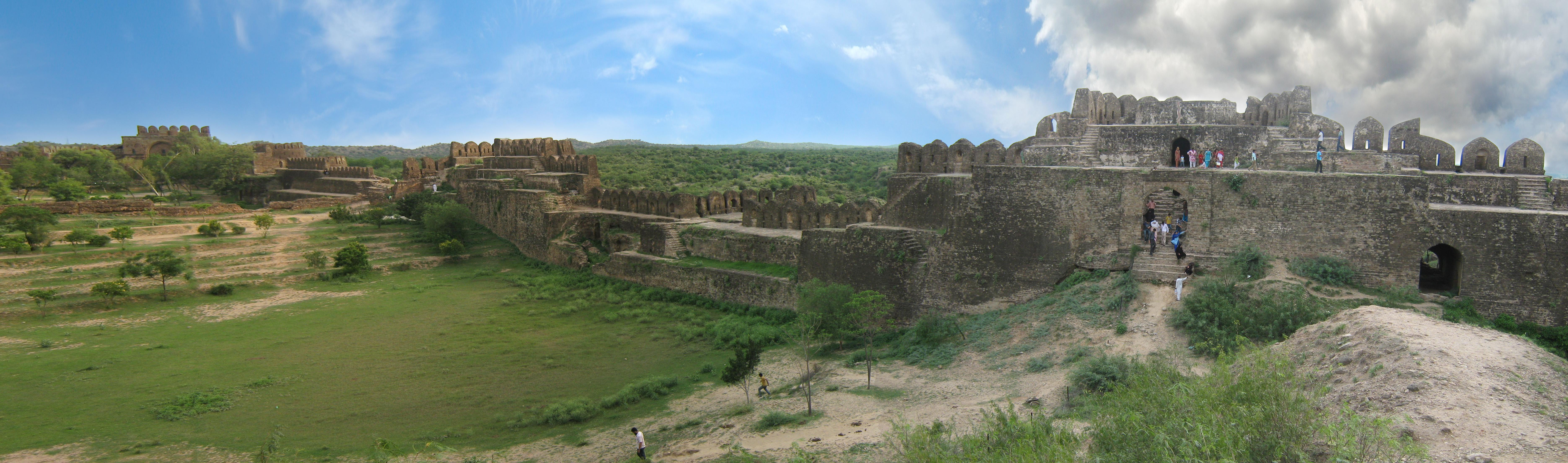 Rohtas view. Pakistan Distt Jhelum